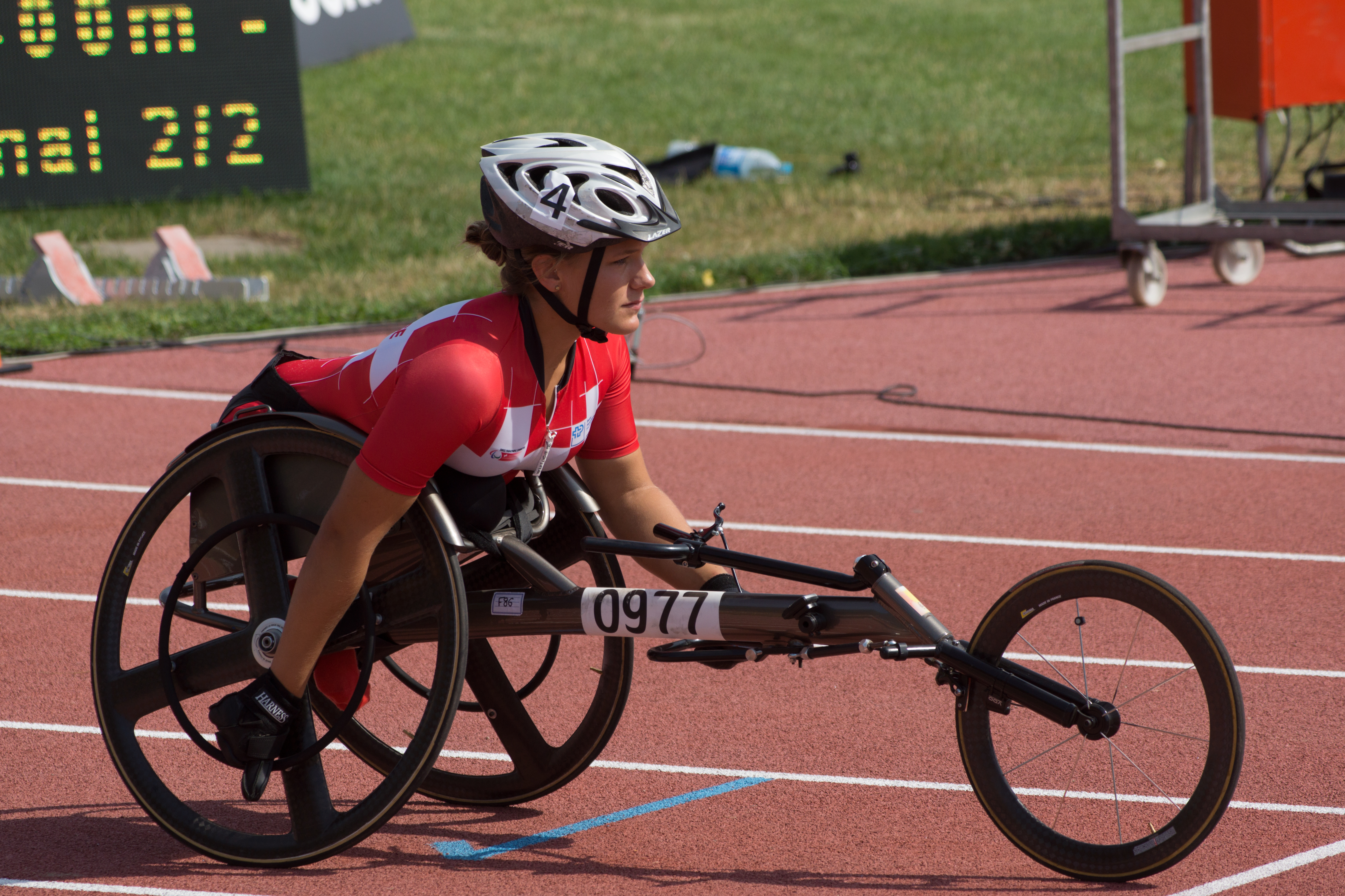 Catherine Debrunner lors de la demie-finale du 400 mètres T54 des championnats du monde d'athlétisme IPC 2013.